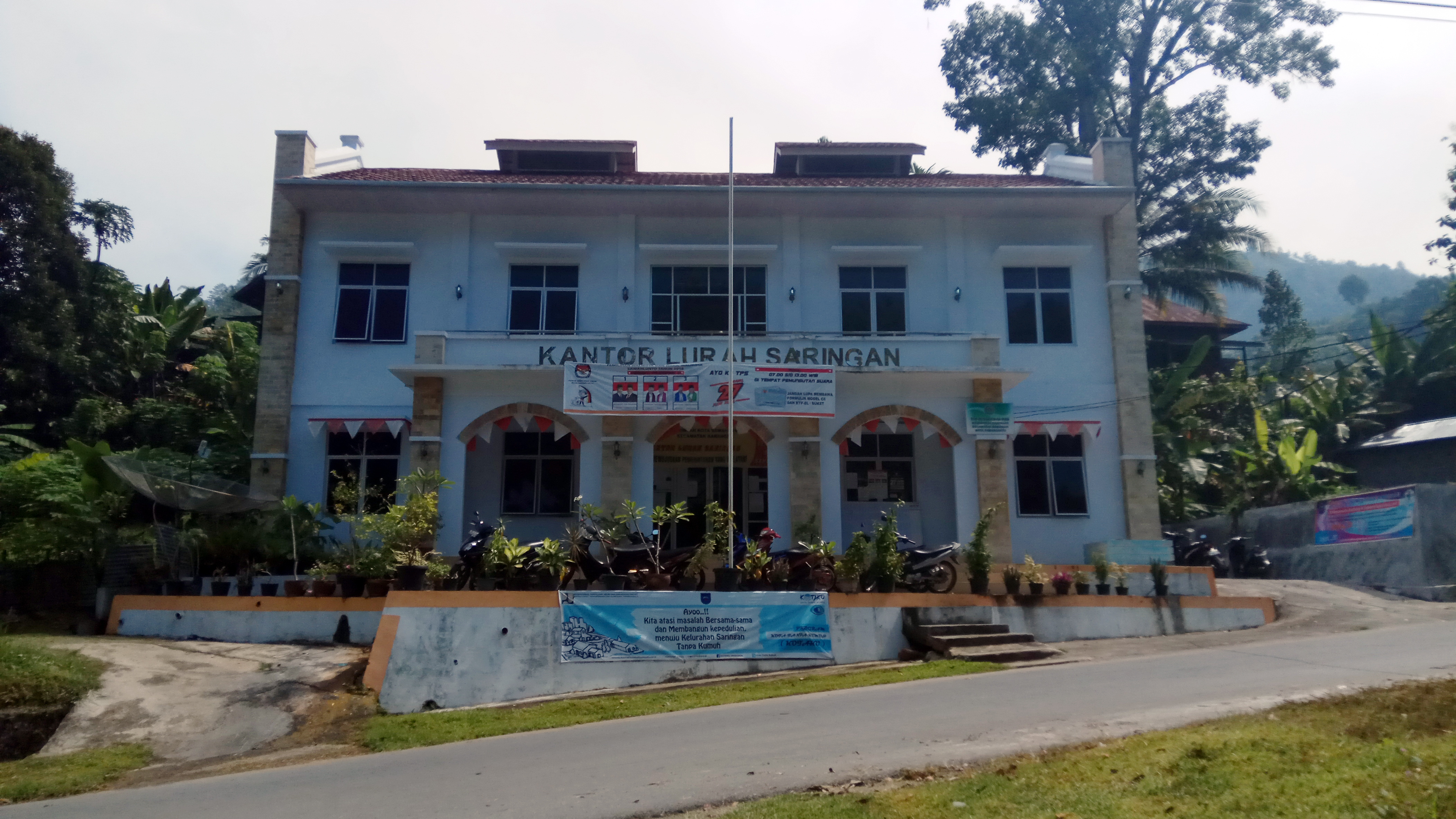 Kantor Kelurahan Saringan, Barangin, Sawahlunto